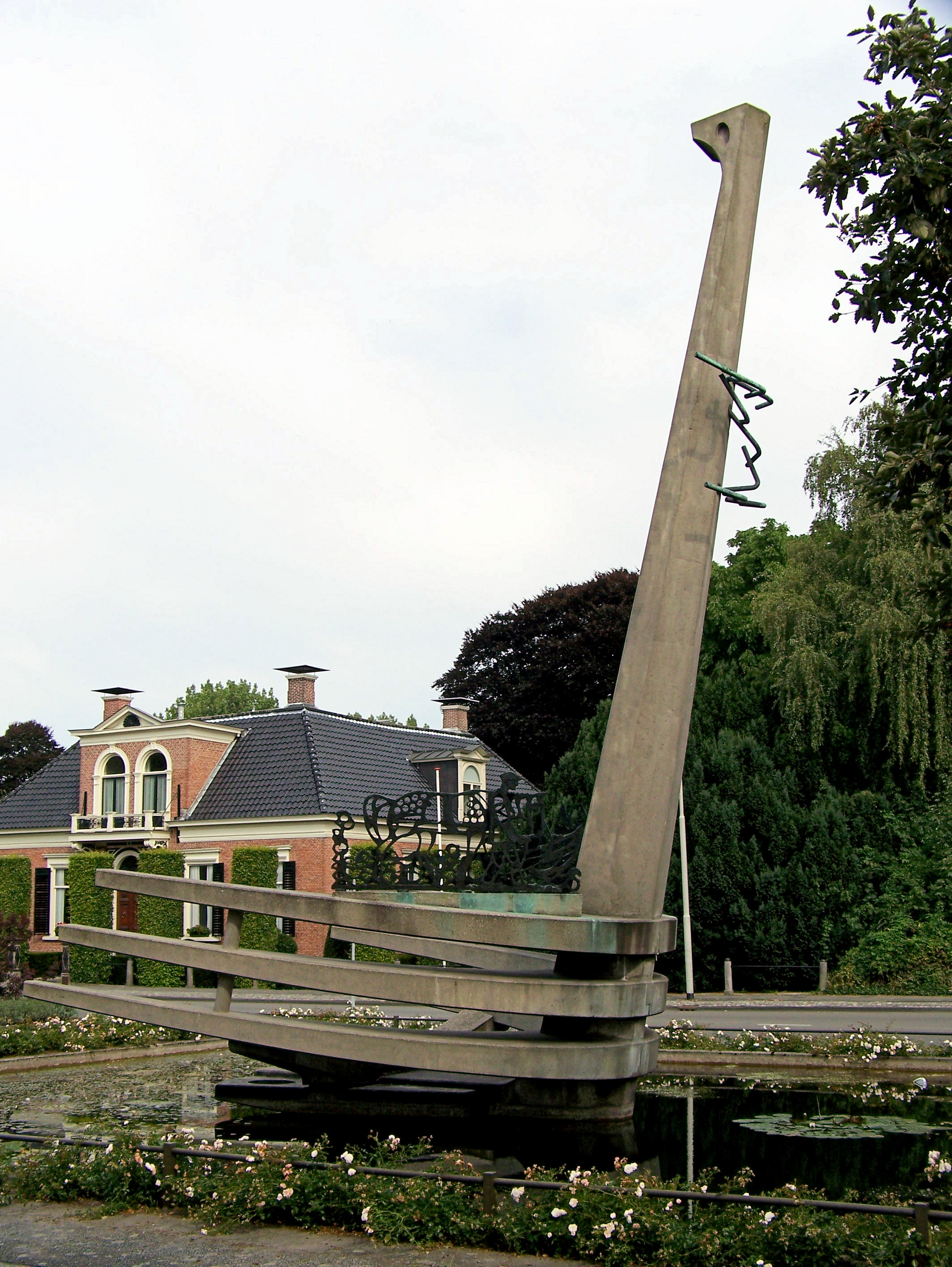 "Boeg" (1970) in Hoogezand (NL), ontworpen door Nico Bulder, uitgevoerd door Gerrit Piek